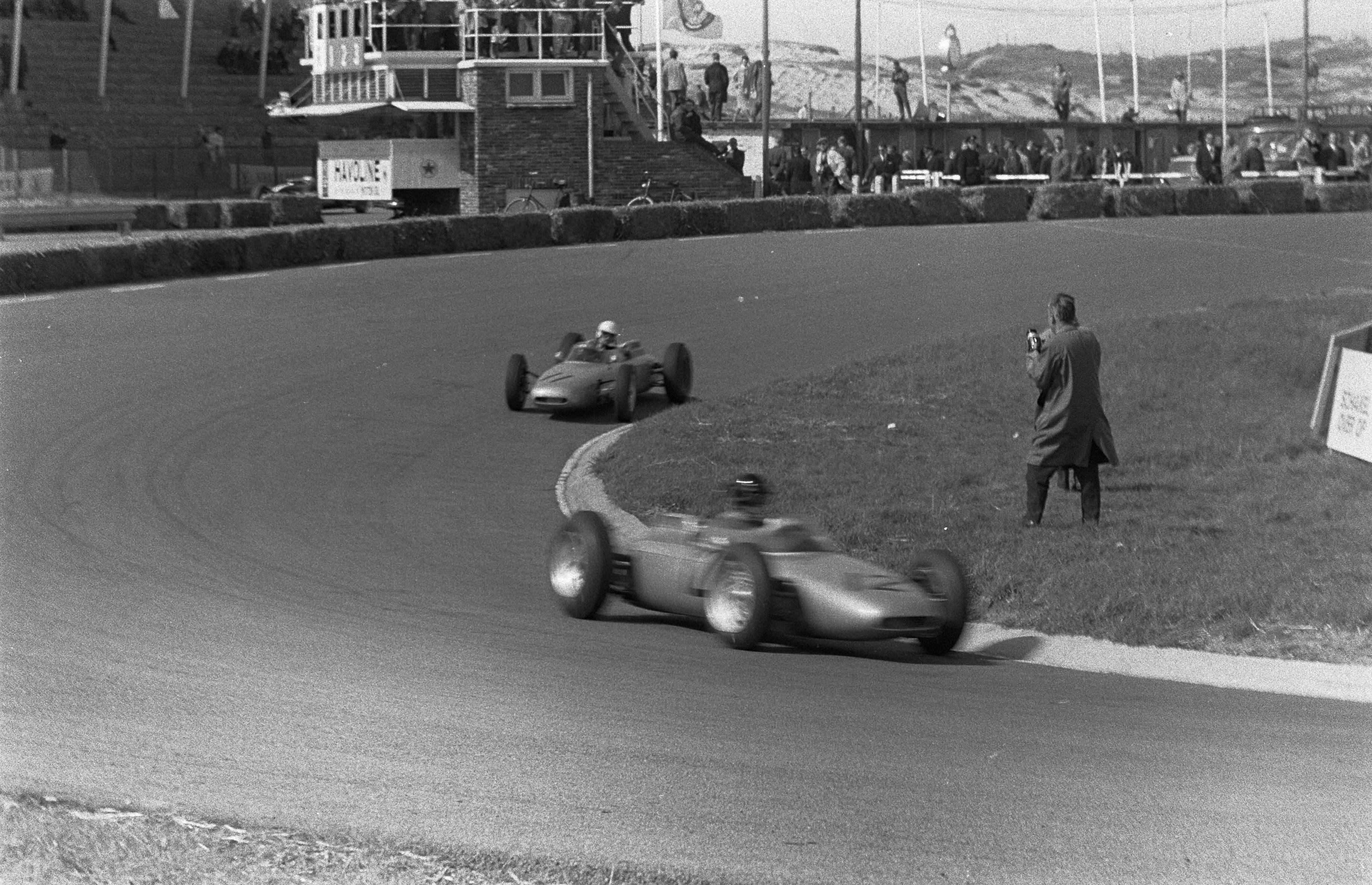 Collectie / Archief : Fotocollectie Anefo Reportage / Serie : [ onbekend ] Beschrijving : Trainingsritten op Circuit van Zandvoort ( Ricardo Rodriguez ) Datum : 18 mei 1962 Locatie : Noord-Holland, Zandvoort Trefwoorden : Trainingsritten, circuits Persoonsnaam : Rodriguez, Ricardo Fotograaf : Bilsen, Joop van / Anefo Auteursrechthebbende : Nationaal Archief Materiaalsoort : Negatief (zwart/wit) Nummer archiefinventaris : bekijk toegang 2.24.01.05 Bestanddeelnummer : 913-9363 Reacties Geplaatst door Luc Ghys op 09 september 2016 - 16:32. Dit zijn Dan Gurney and Jo Bonnier in hun Porsche 708